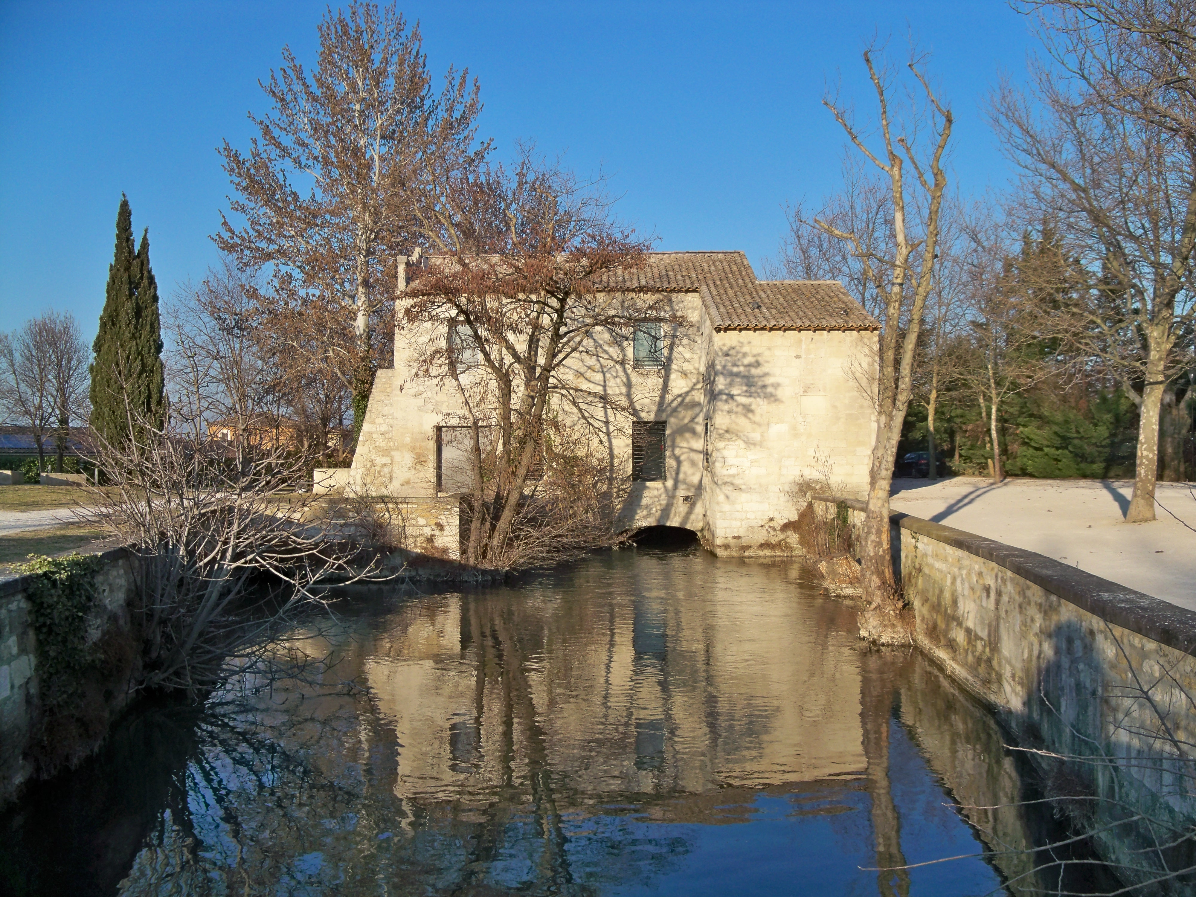 Moulin du Parc Chico Mendes, quartier du Pont des 2 Eaux à Avignon (84)